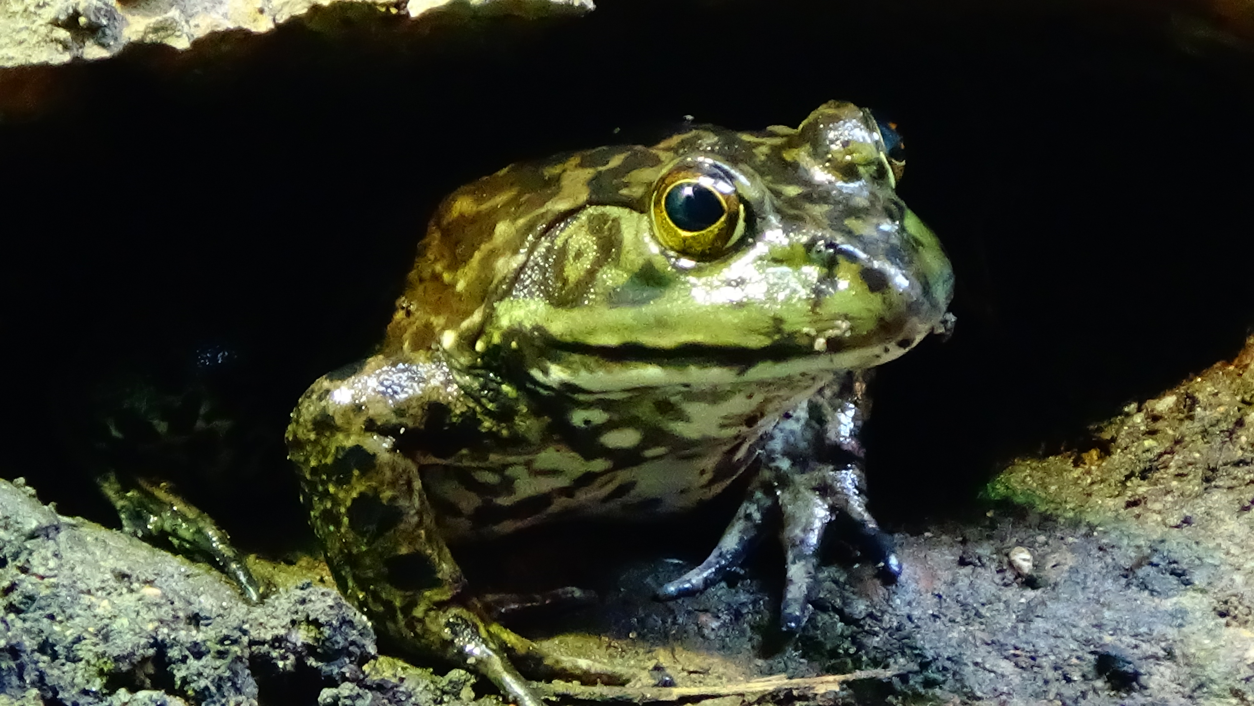 Grenouille taureau - Lithobates catesbeianus - Parc Zoologique de Paris - 03/04/2015